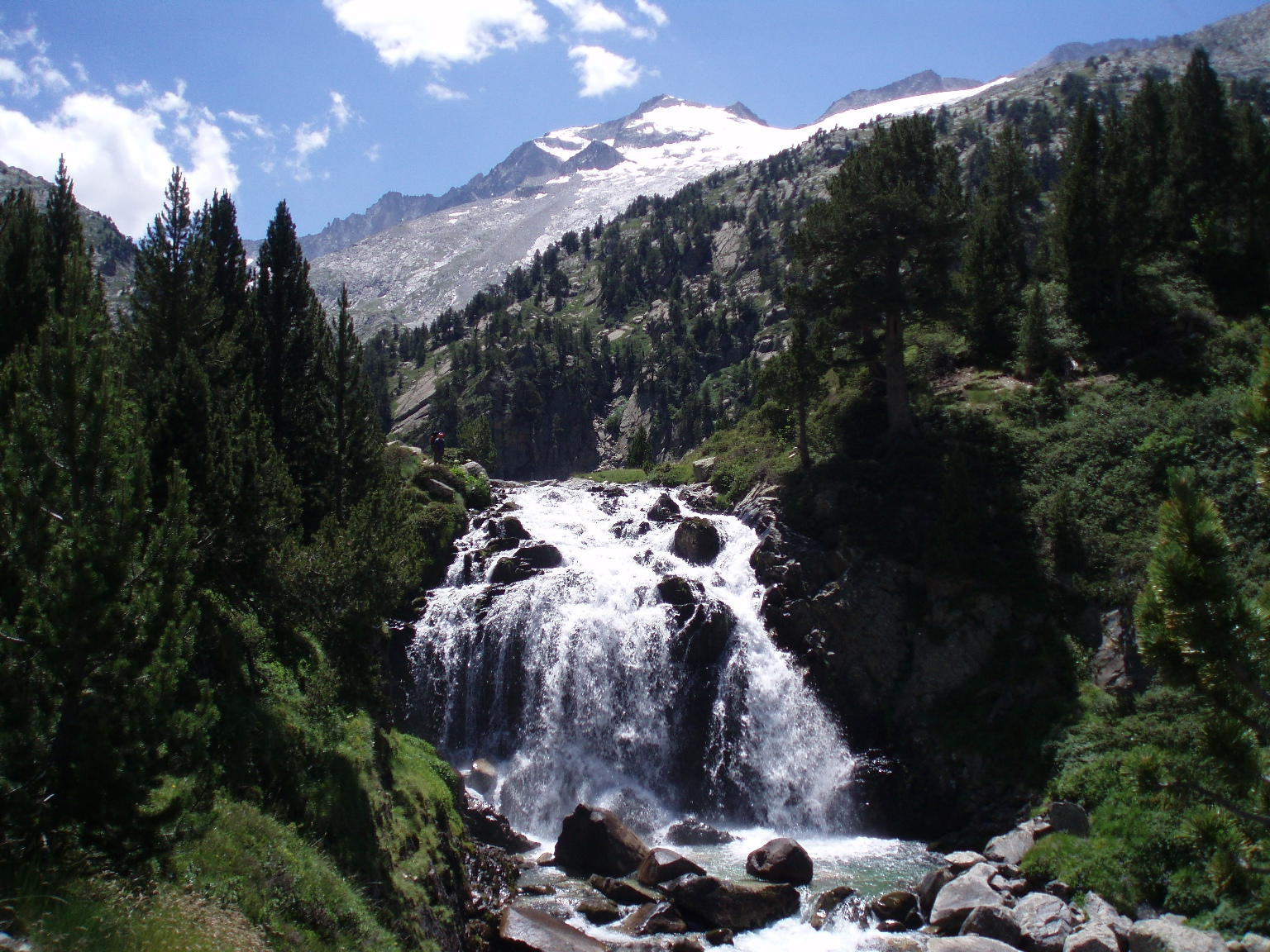 Cascada de Aigualluts con el pico Aneto detrás (Pirineos, España).